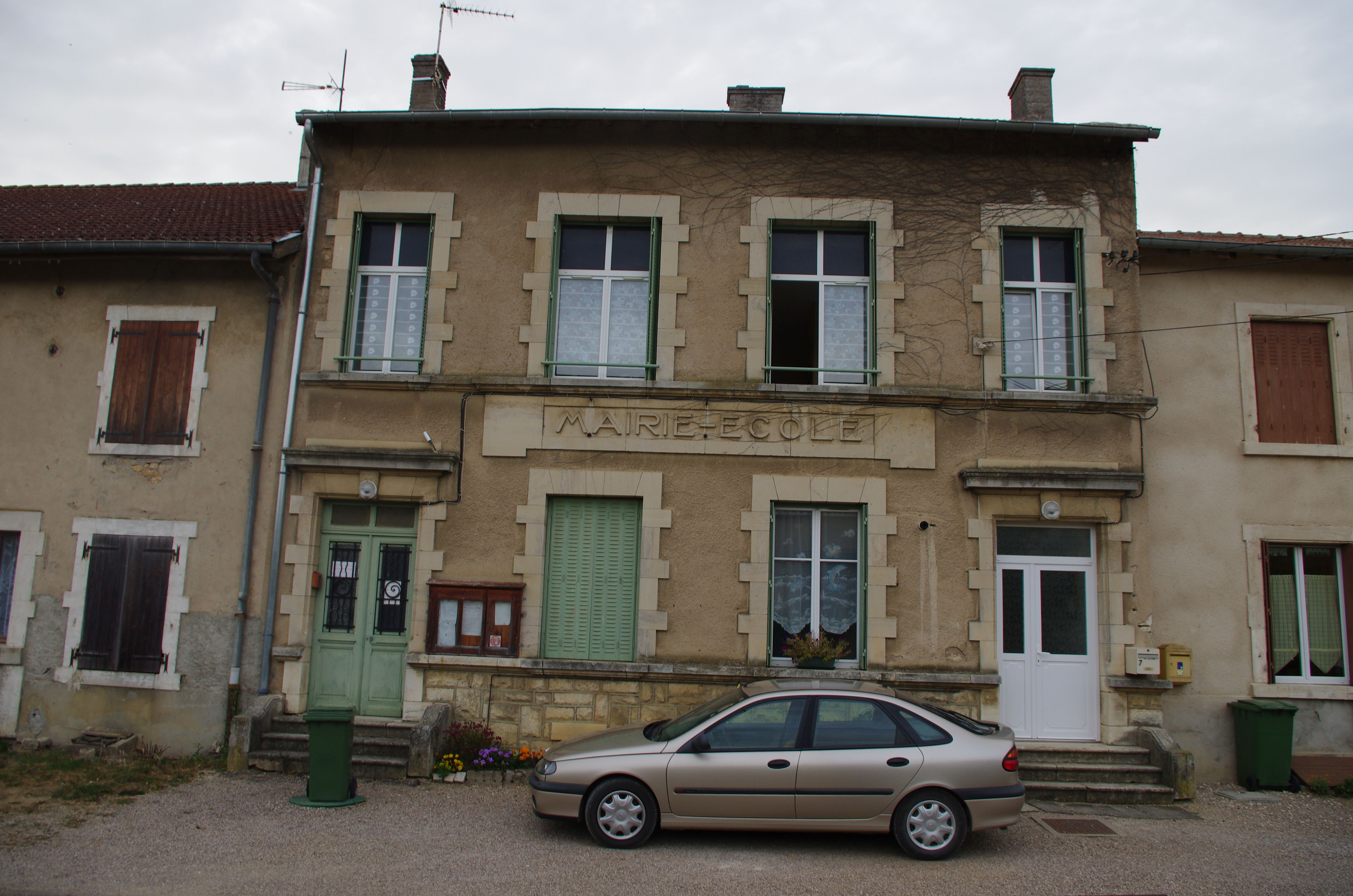 Lahayville im Department Mosel in Lothringen. Die Verwaltung und die Schule des Ortes.